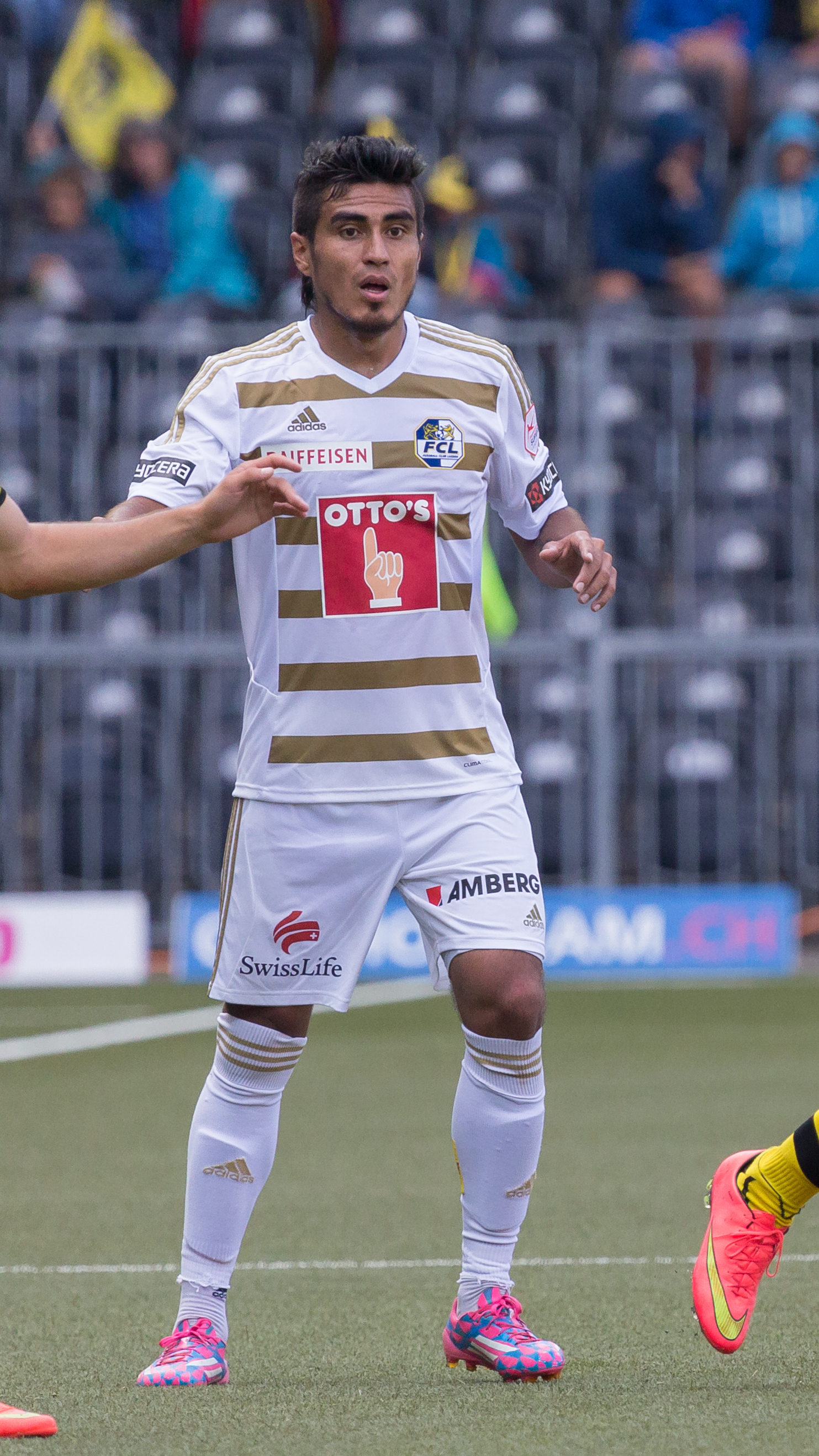 Dario Lezcano beim Spiel des BSC Young Boys gegen den FC Luzern